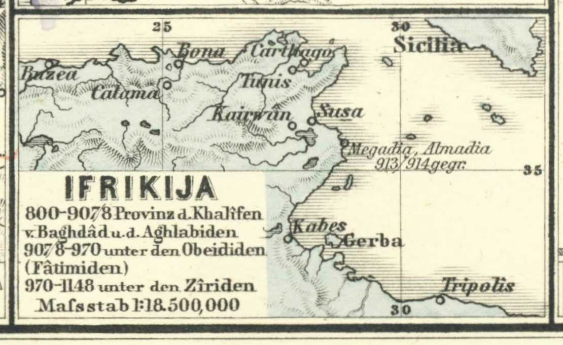 Ifrikija